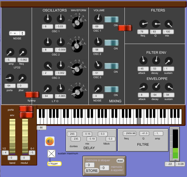 Page de contrôle du synthétiseur POOG réalisé avec Max/MSP par houapLP (Zorglub)